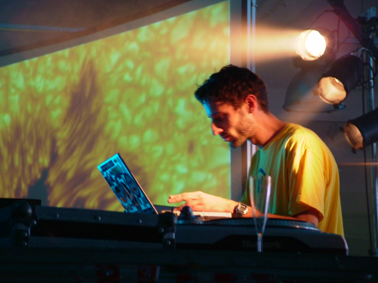 Luke Vibert aux Nuits Sonores 2007 à Lyon